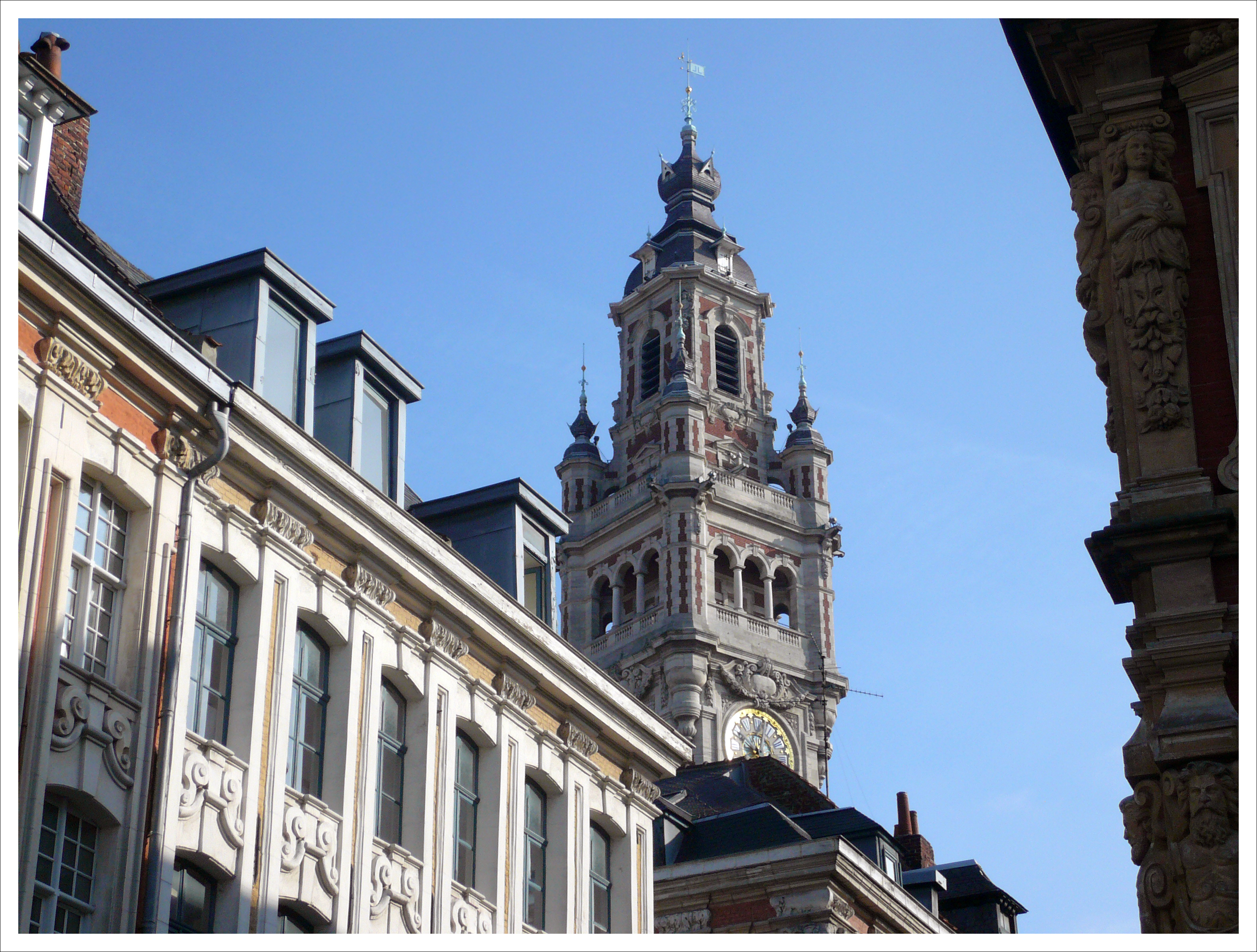 Bâtiments de la Grand' Place et vue sur le beffroi de la chambre de commerce, Lille.